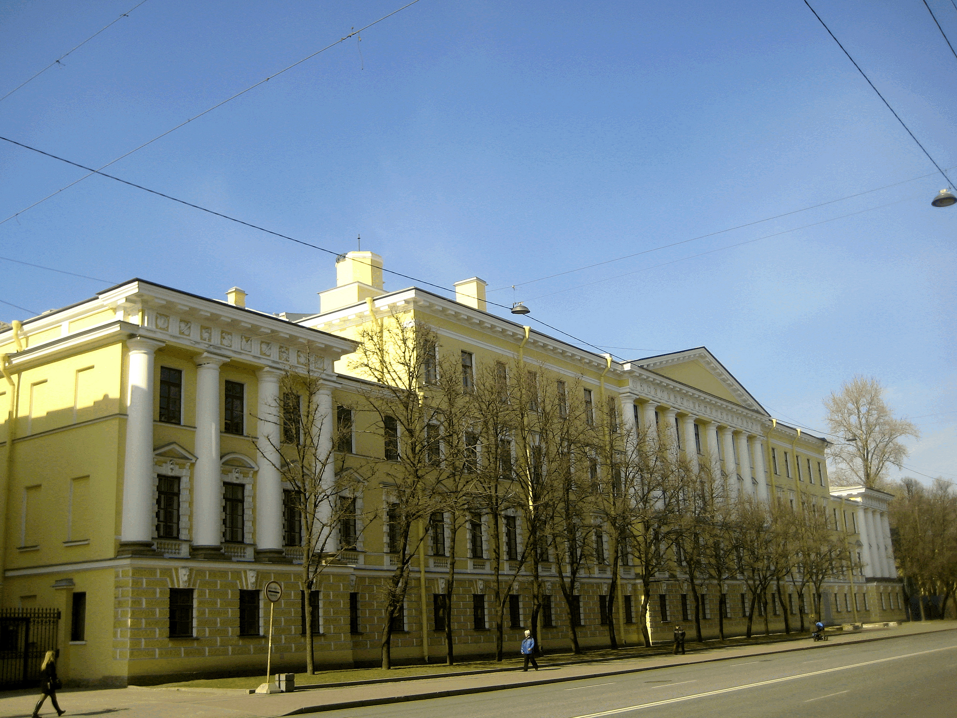 Санкт-Петербург. Московский проспект,17. Императорский военно-сиротский дом. Главное здание. Архитекторы: Штауберт А.Е., Архангельский Н.А.